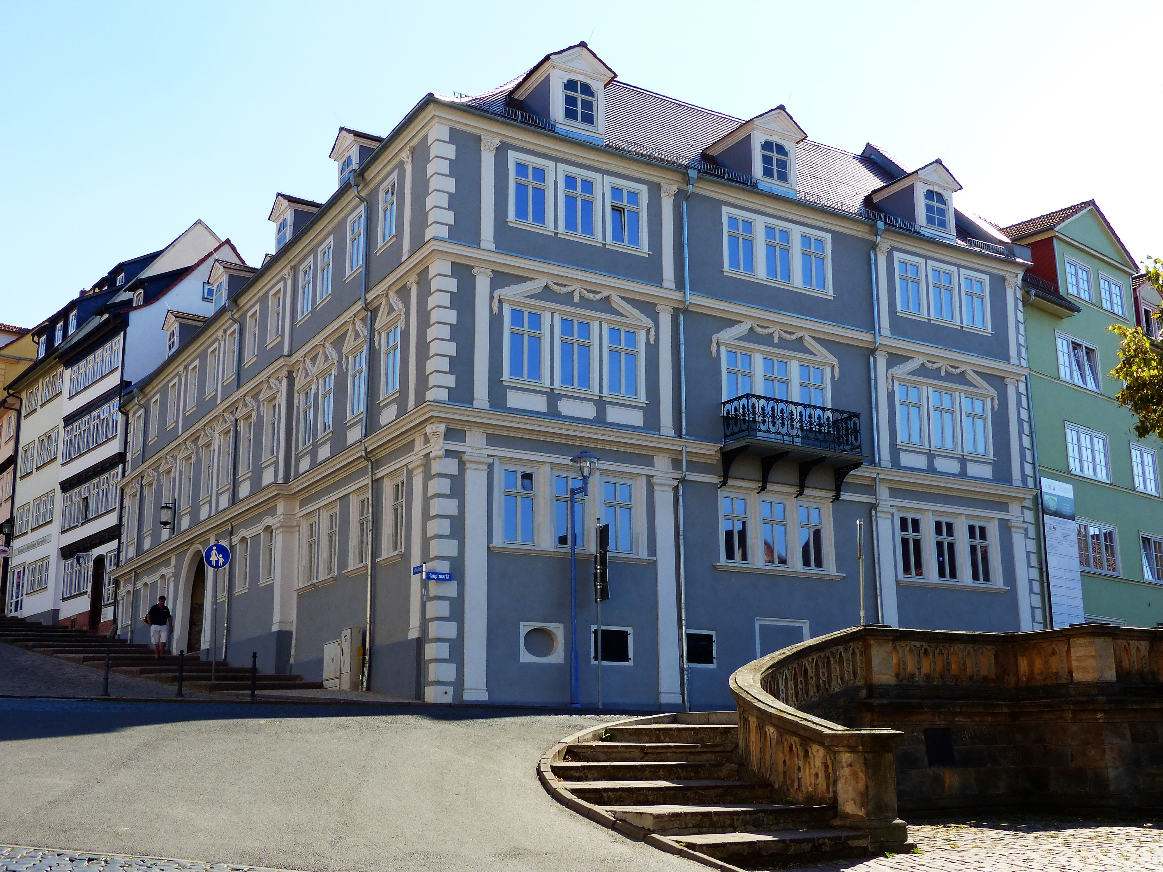 Denkmalgeschütztes Landschaftshaus, Schloßberg 2, Gotha